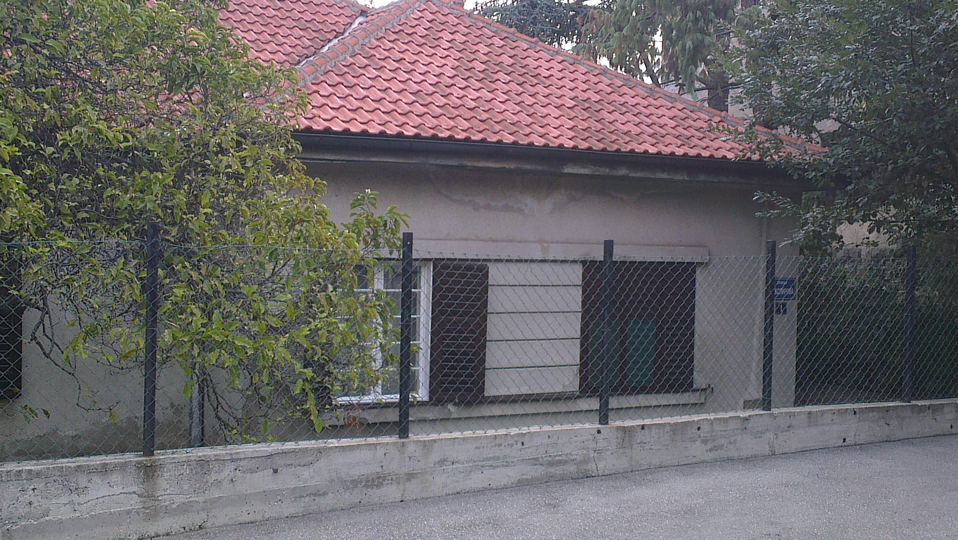 Кућа Бранислава Нушића